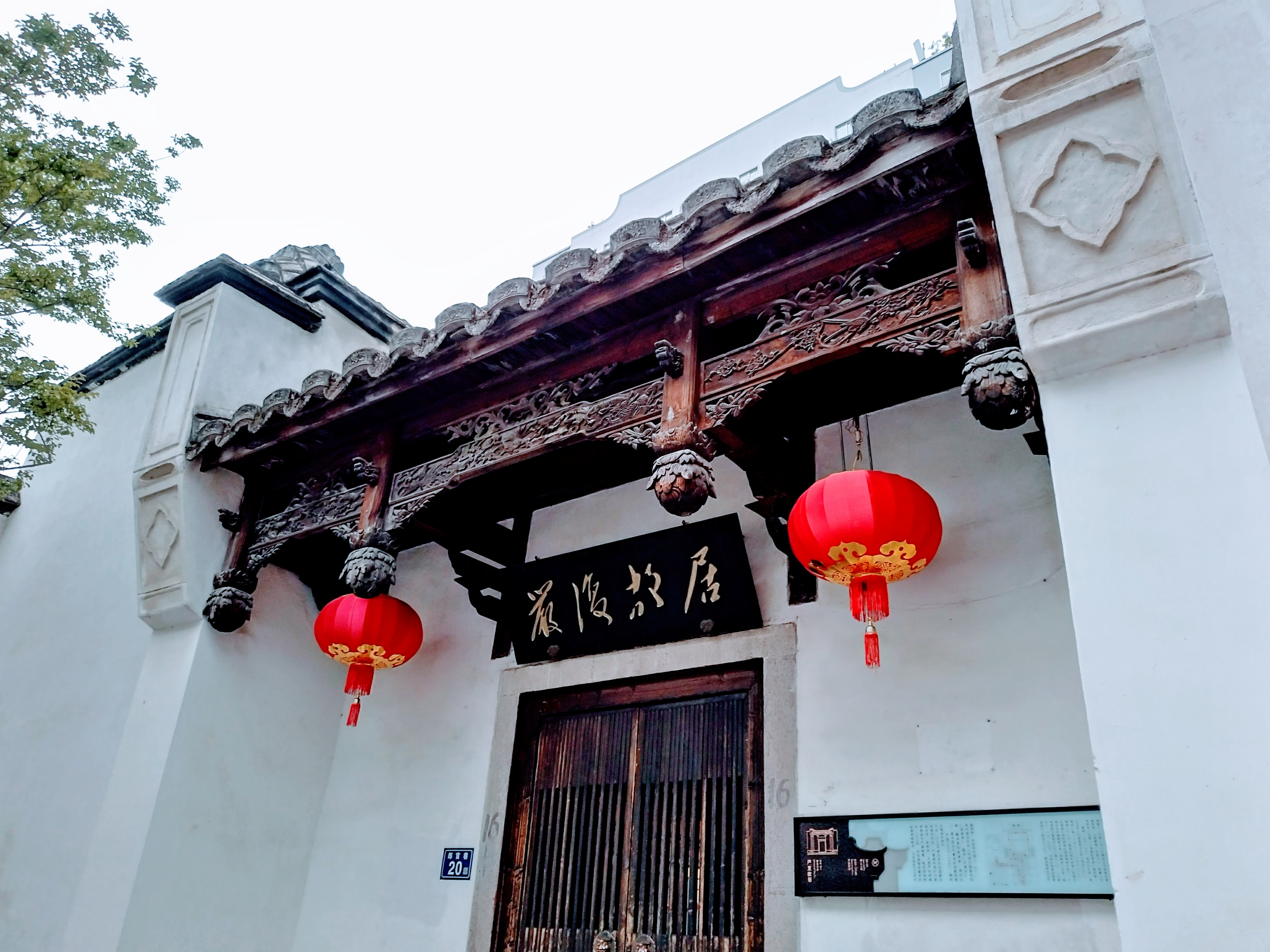 福州嚴復故居